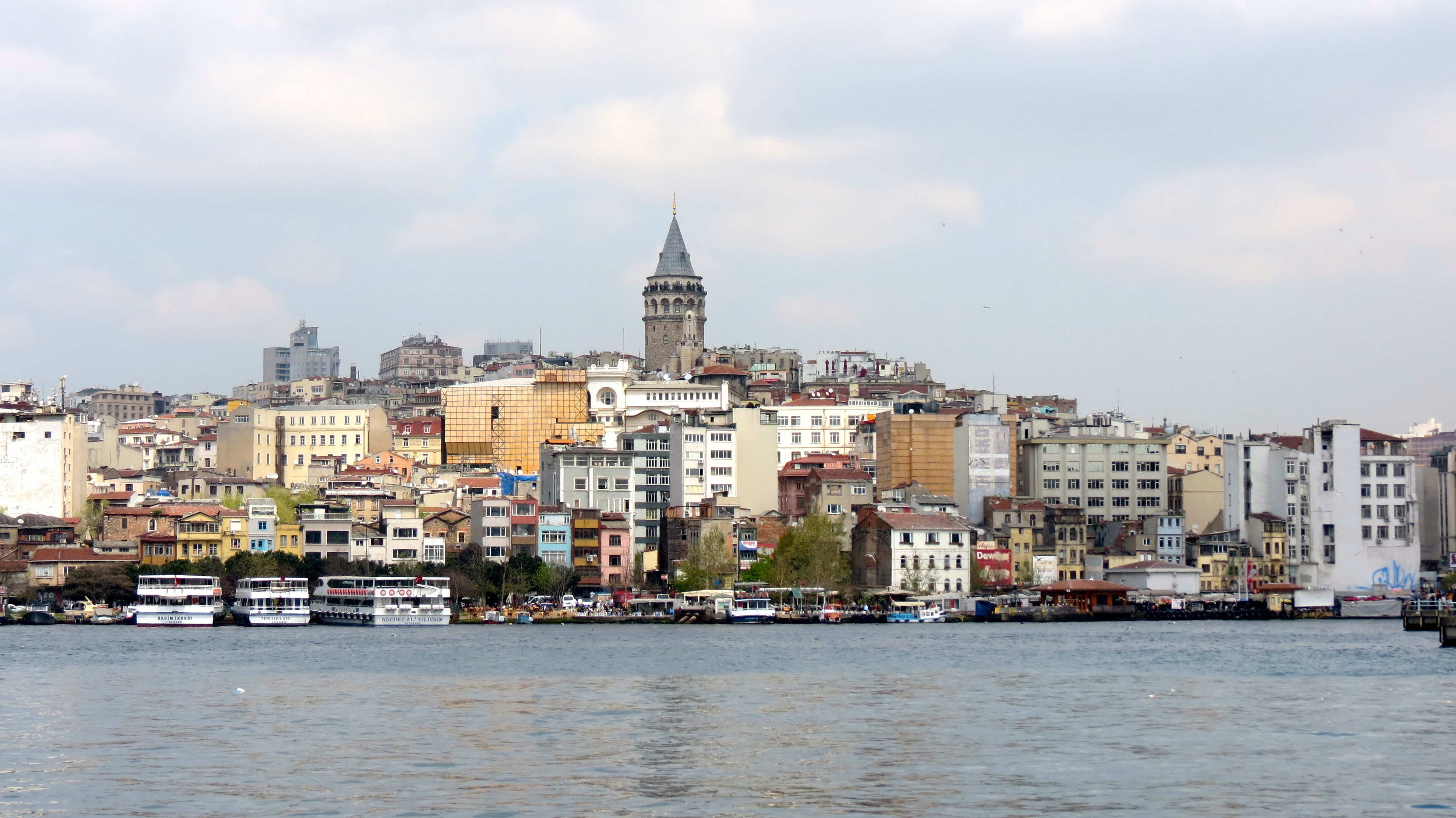 Galata